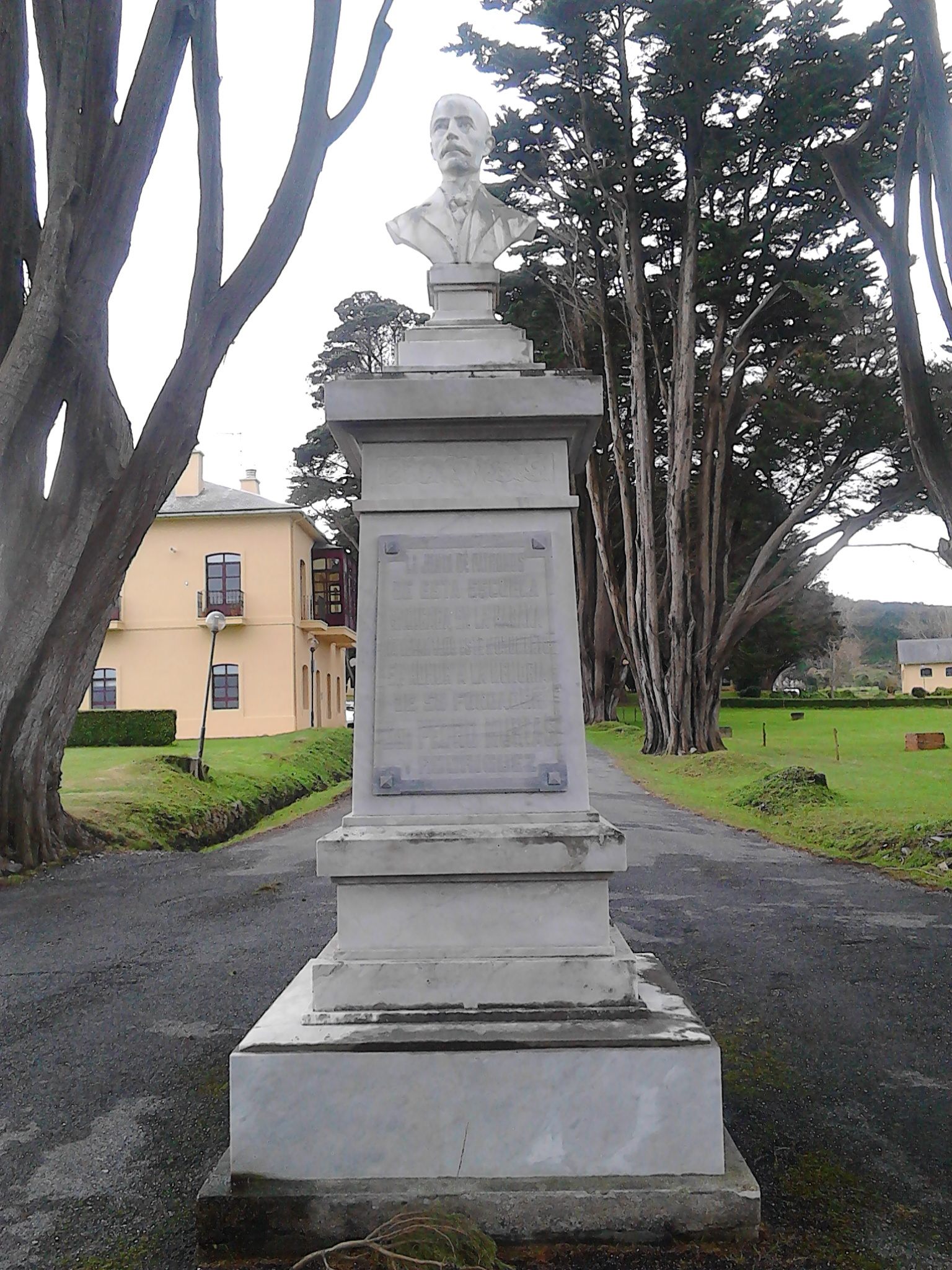 Busto de Pedro Murias, monumento á entrada da granxa escola. A lenda di: "La Junta de Patronos de esta escuela reunida en la Habana en honra a la memoria de su fundador Don Pedro Murias y Rodríguez"